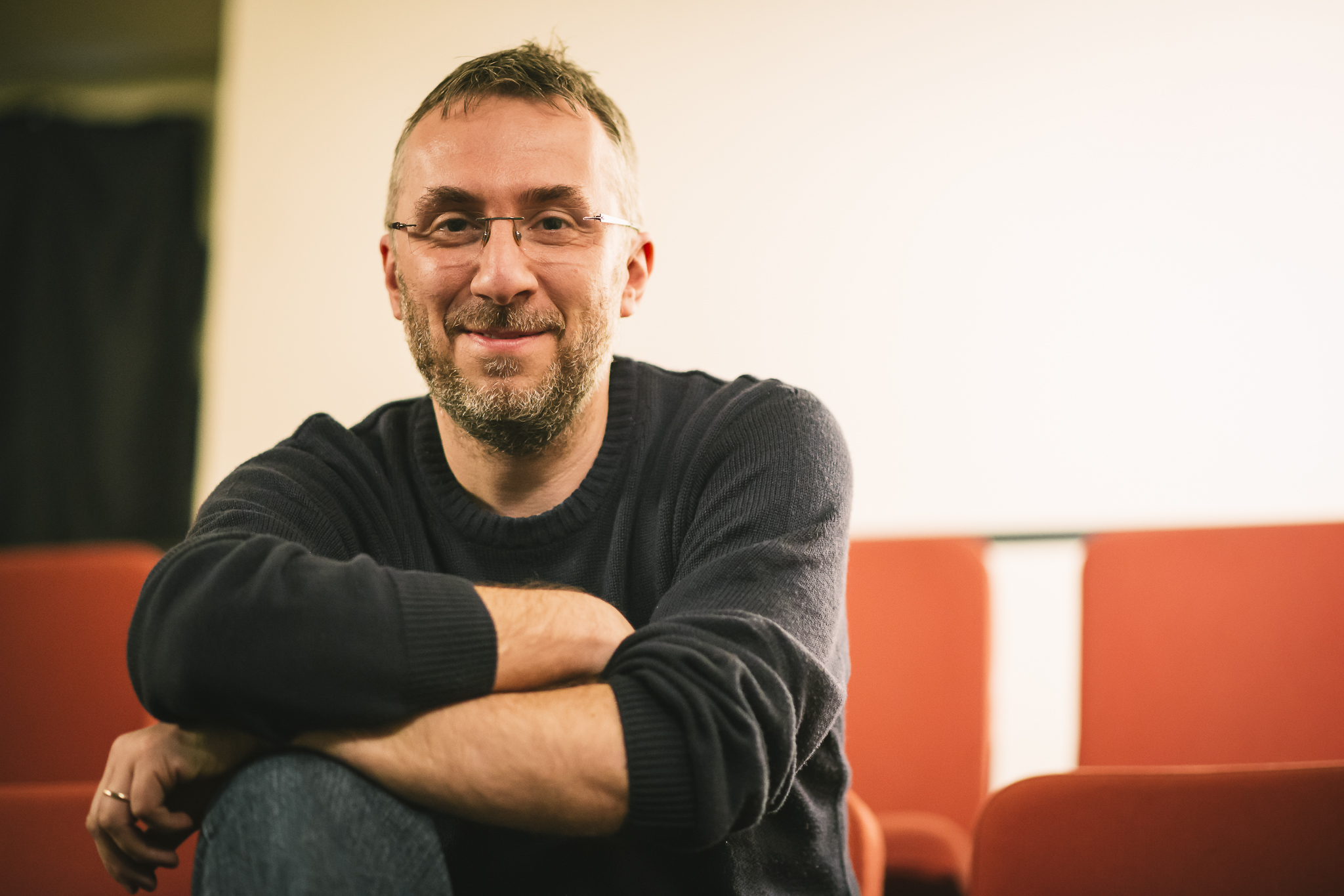 Foto di Luca Ricci (regista)